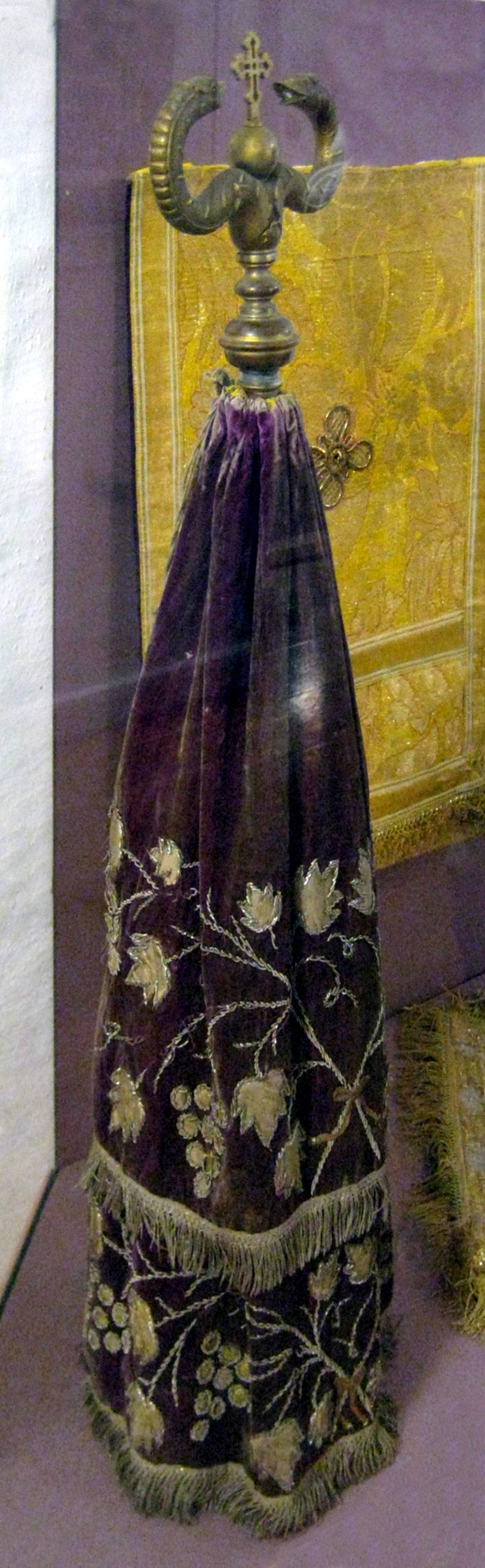 Верхняя часть посоха архимандрита. 19 век. Кирилло-Белозерский монастырь